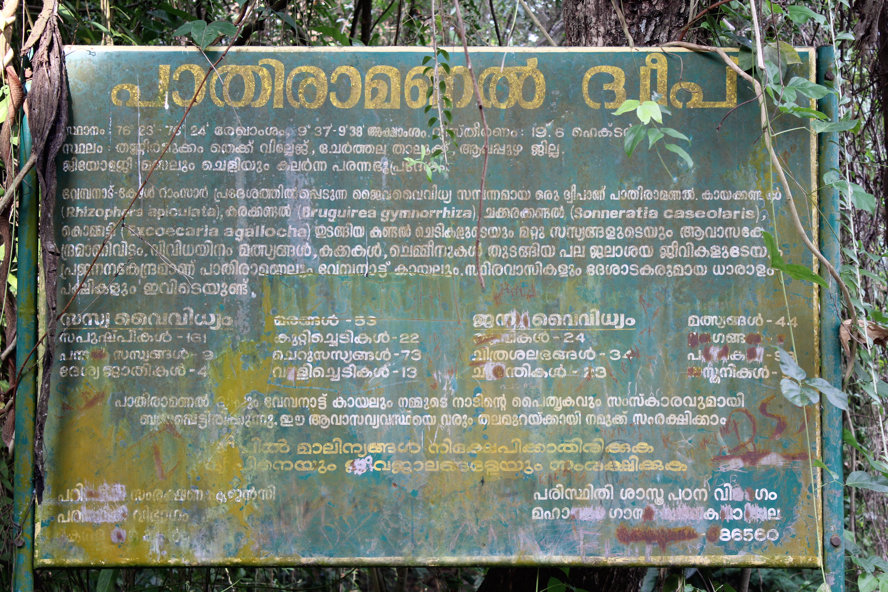 വേമ്പനാട്ടുകായലില്‍ പാതിരാമണല്‍ ദ്വീപിലെ നോട്ടീസ് ബോര്‍ഡ്.